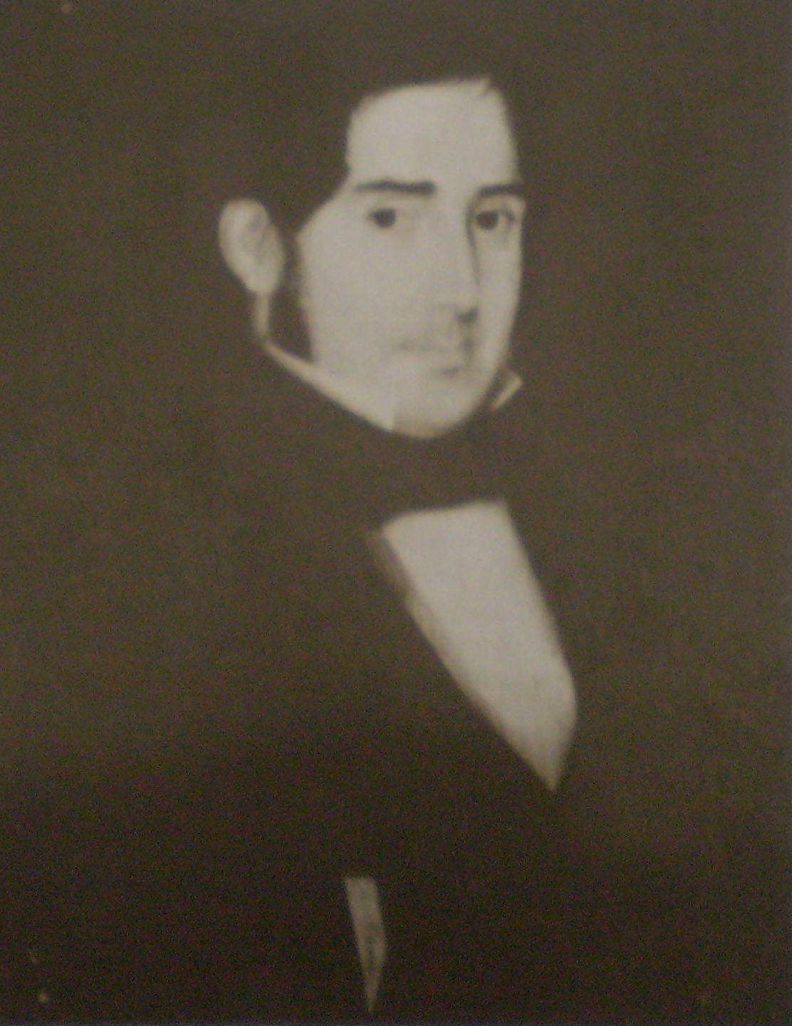 Esteban Agustín Gascón